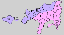 香川県小豆郡の町村。